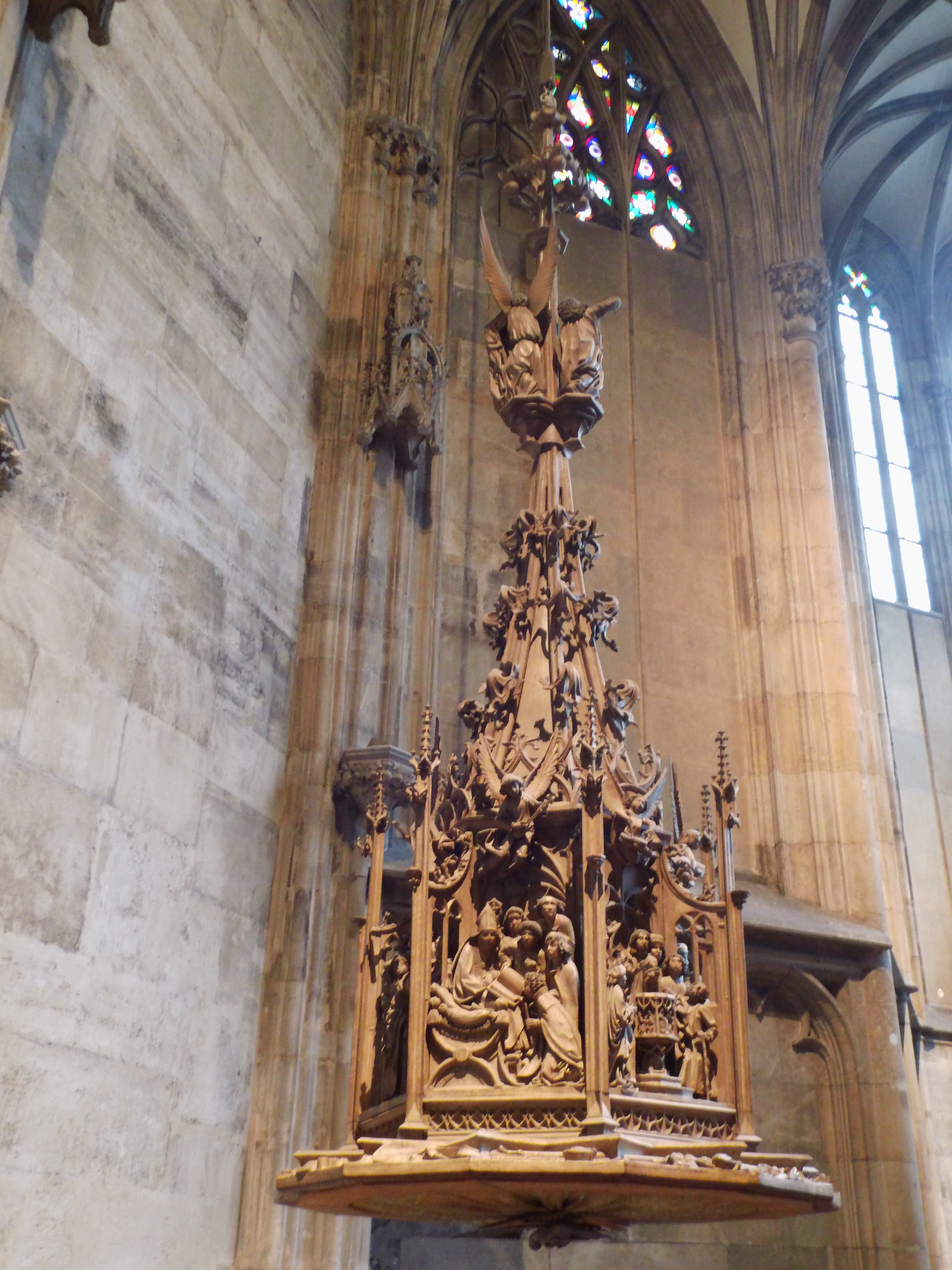 Der ehemalige Schalldeckel der Kanzel des Stephansdoms (Wien) bekrönt heute das Taufbecken in der Katharinenkapelle – siehe Kanzel des Stephansdoms (Wien)#Schalldeckel.